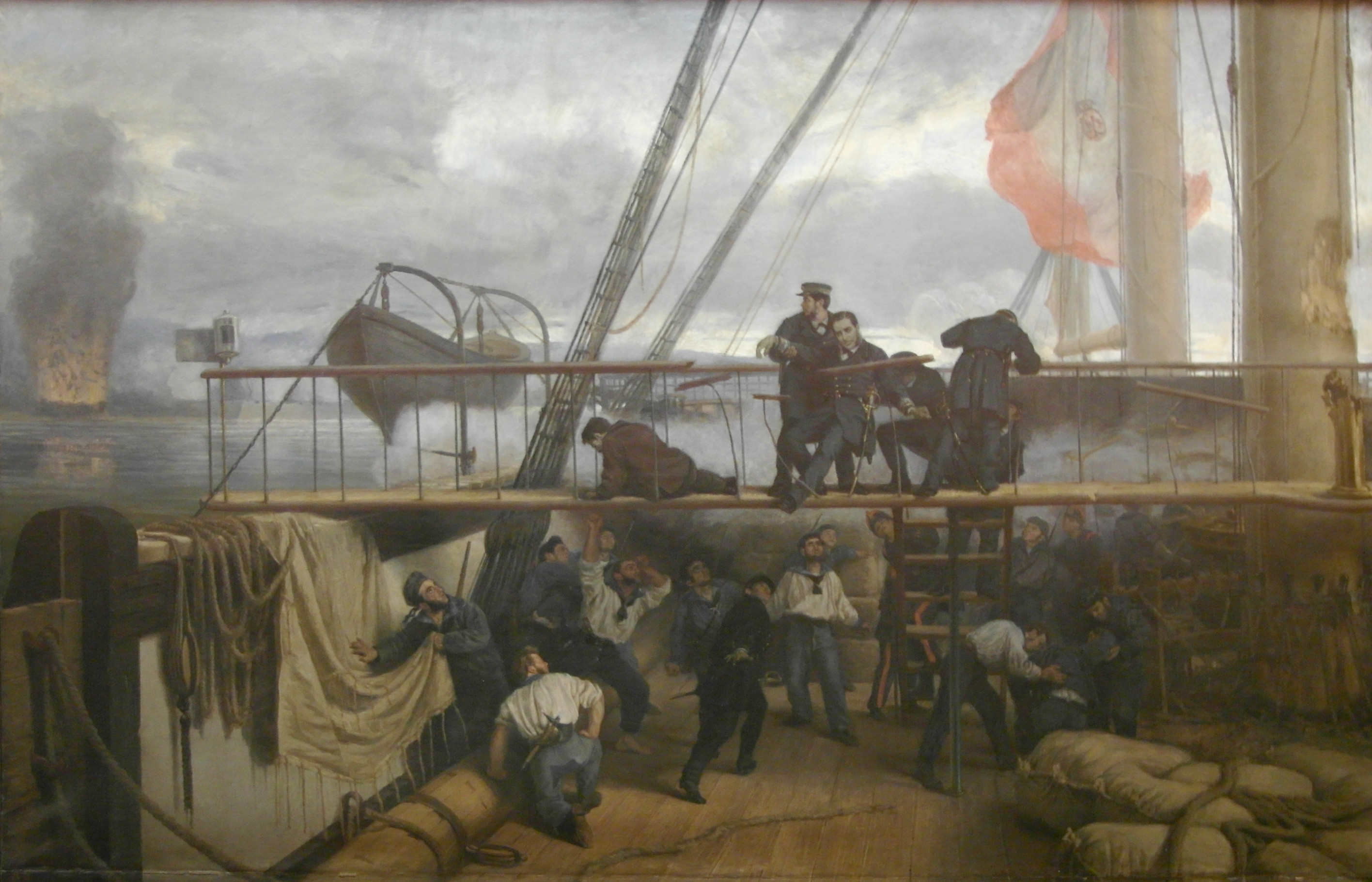 El liezo representa el momento en que cayó herido Momeel brigadier Casto Méndez Núñez en el puente de la fragata Numancia durante el bombardeo de la flota española a los fuertes de El Callao, el día 2 de mayo de 1866.